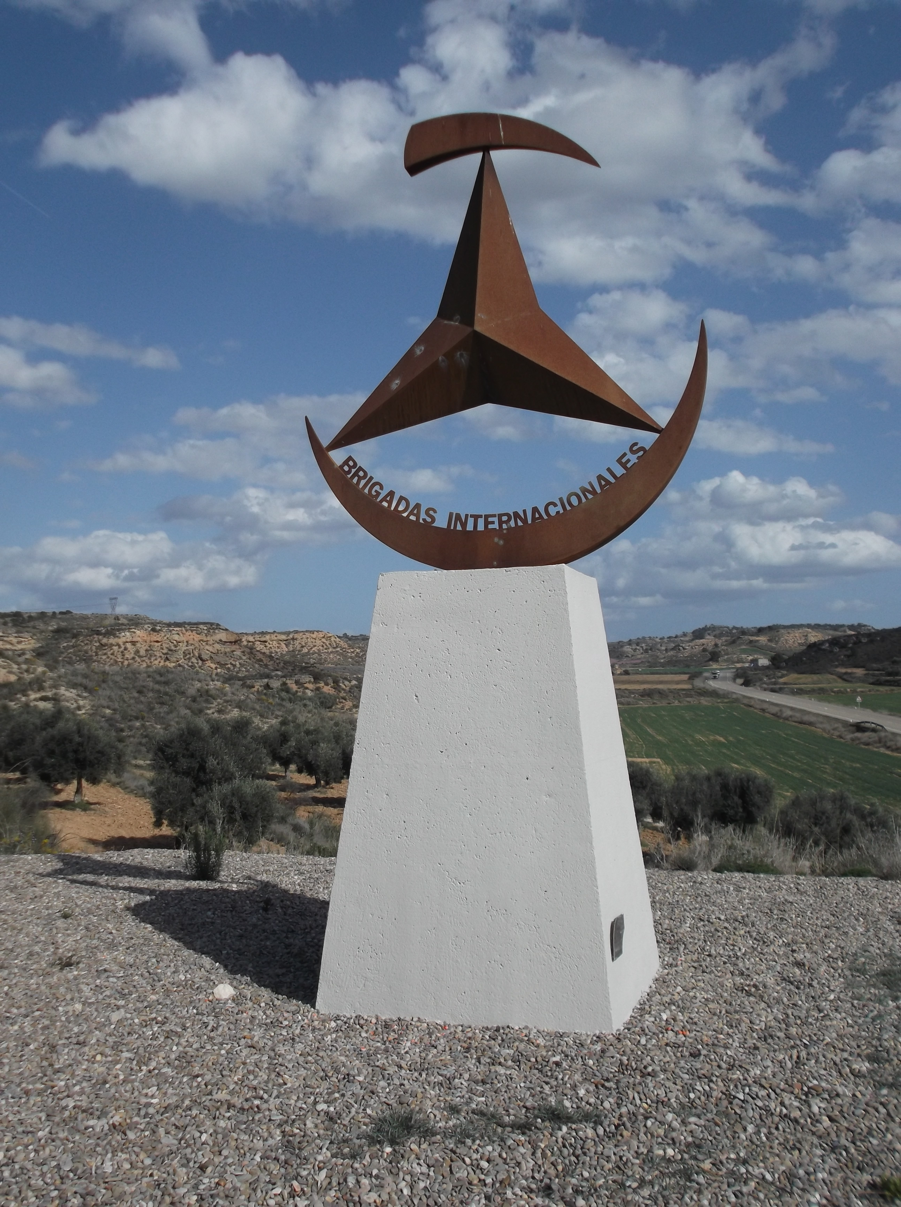 Monumento dedicado a las Brigadas Internacionales inaugurado en Caspe (Aragón) en 2018. Rinde homenaje a las Brigadas Internacionales que participaron en la Batalla de Caspe (1938), en el transcurso de la Guerra Civil Española.